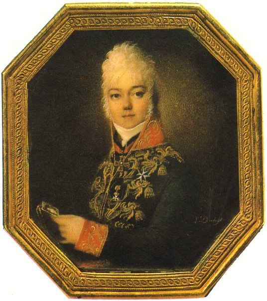 Александр Алексеевич Яковлев (1762-1825), дядя Герцена